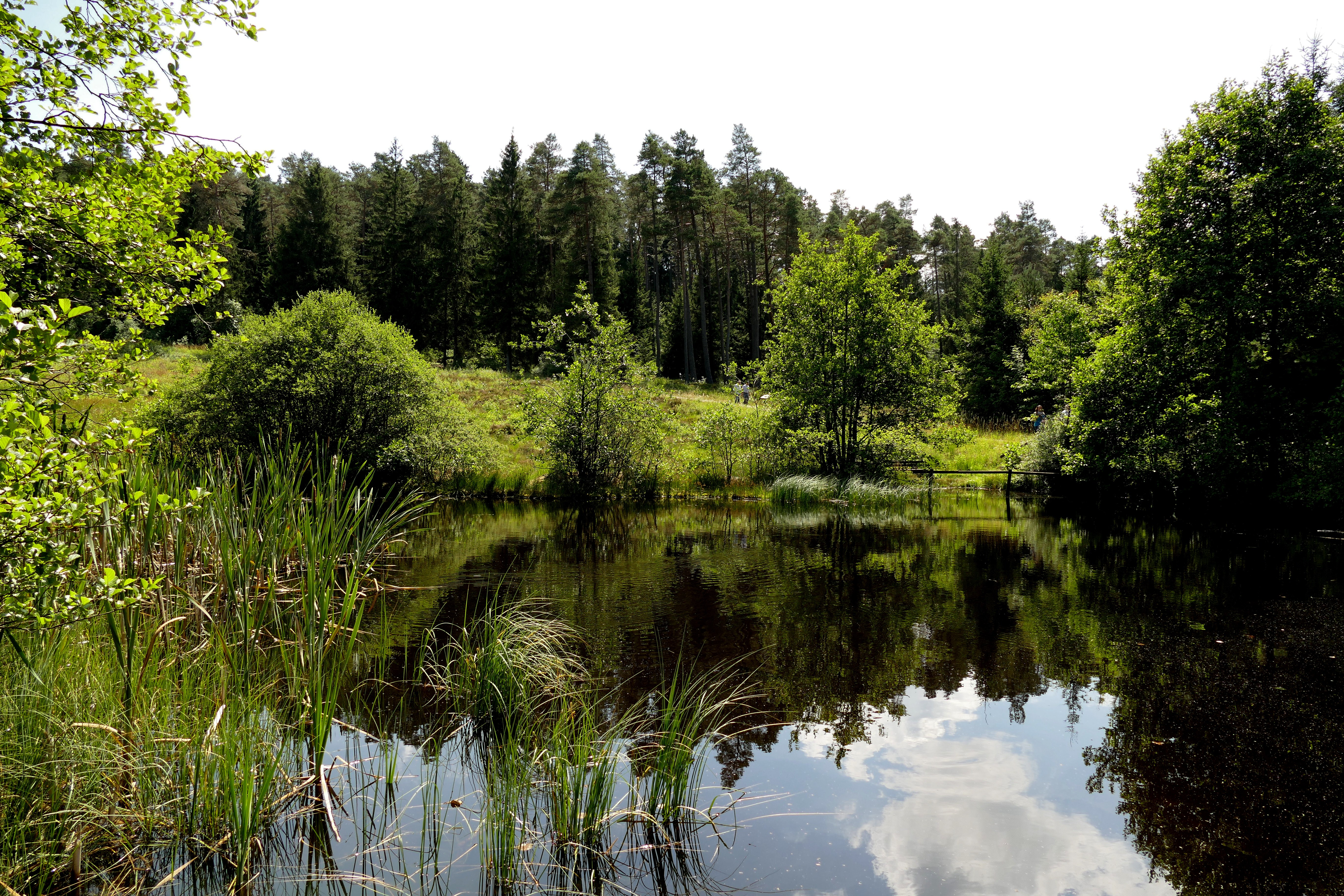 Teich im Naturschutzgebiet „In der Wasserdell“ (NSG EU-091), Dahlem